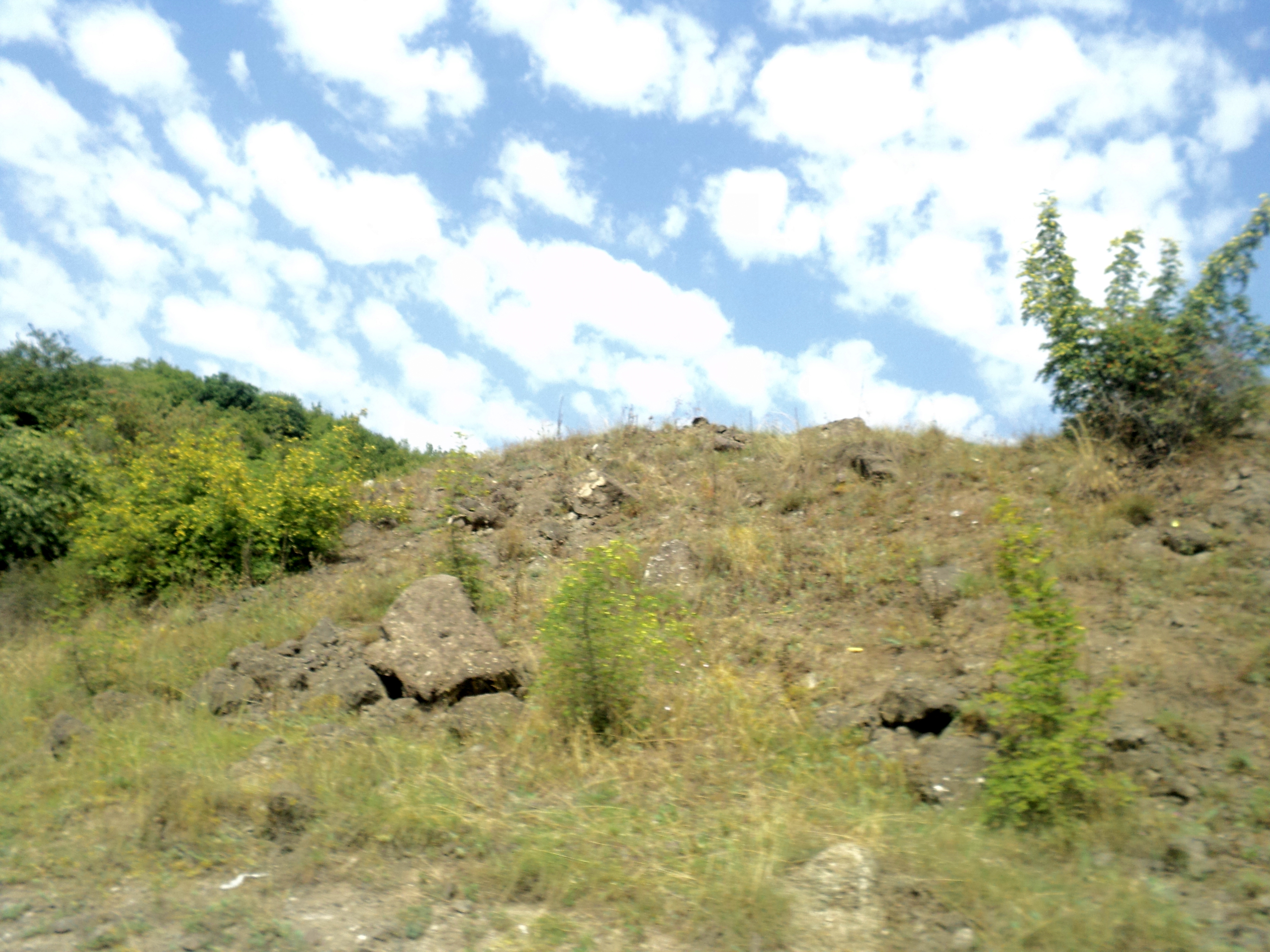 Բերդ, անտառտնտեսություն